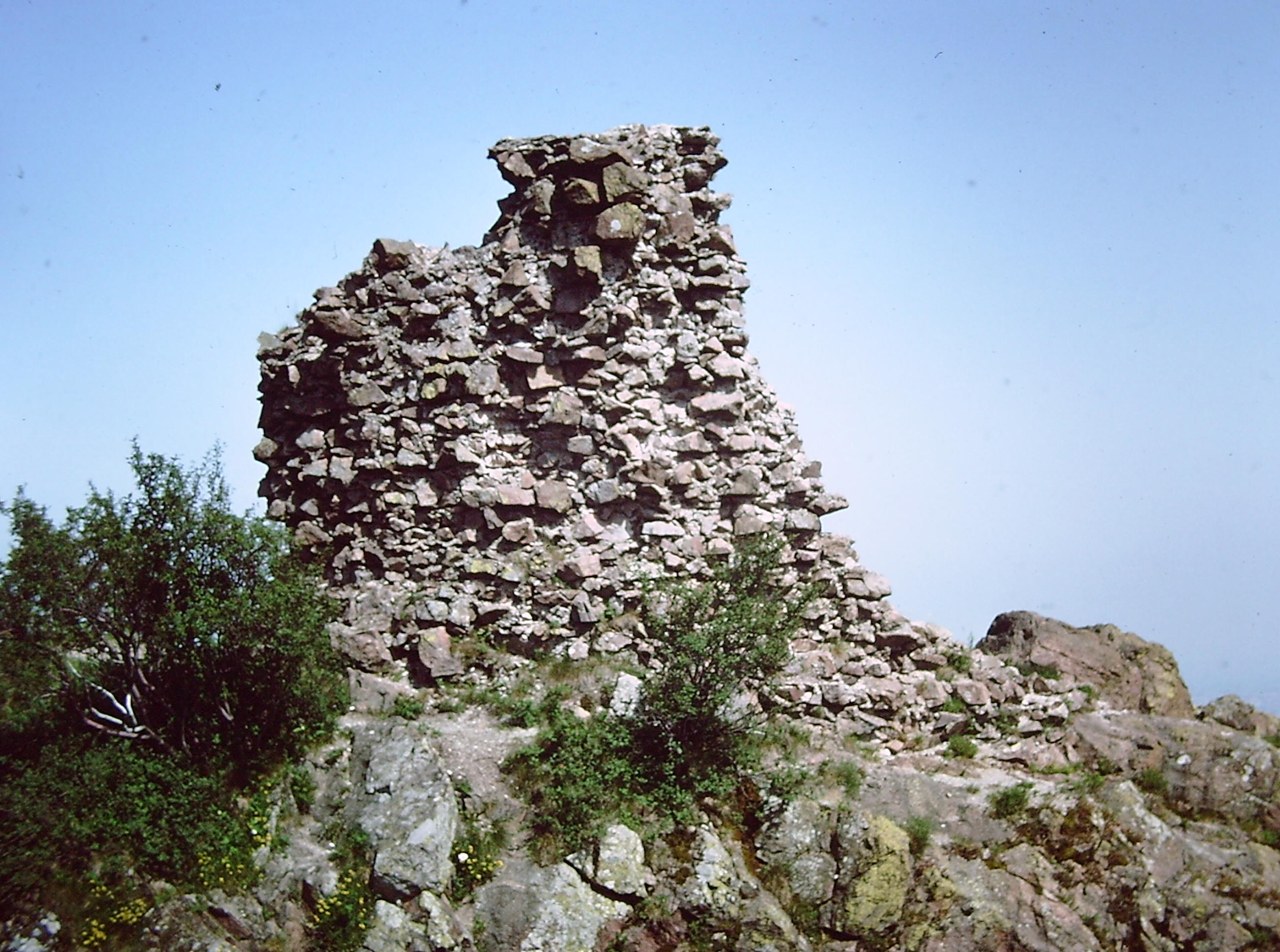 Vue du donjon